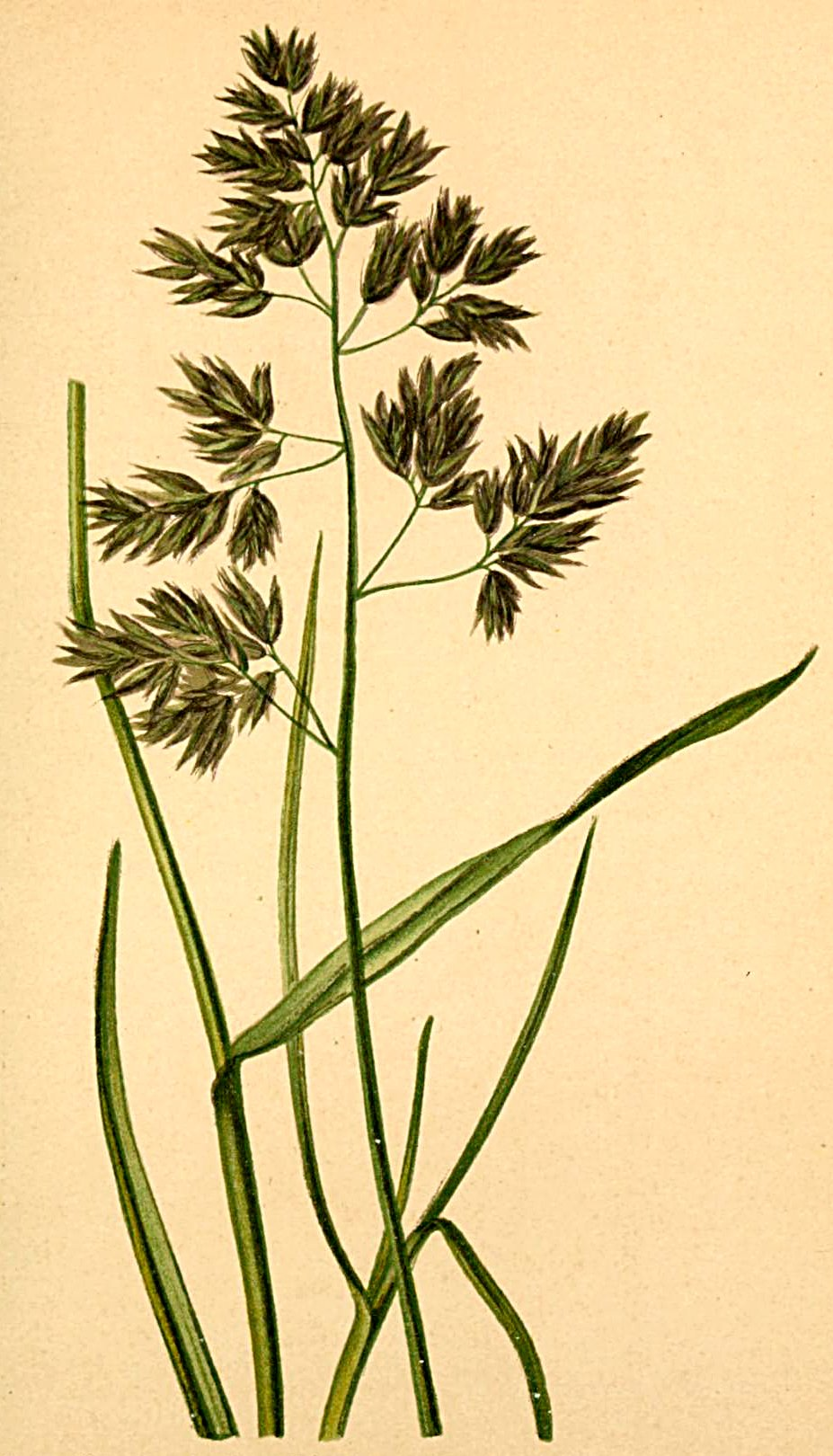 Poa distichophylla (Poa cenisia)